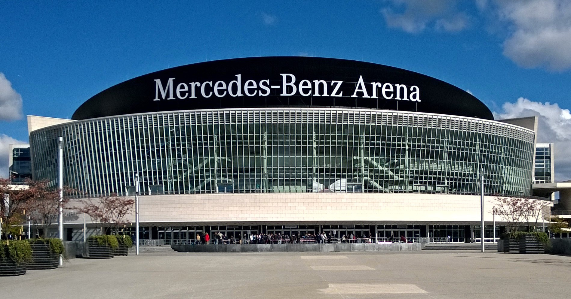 Friedrichshain, Berlin, Germany